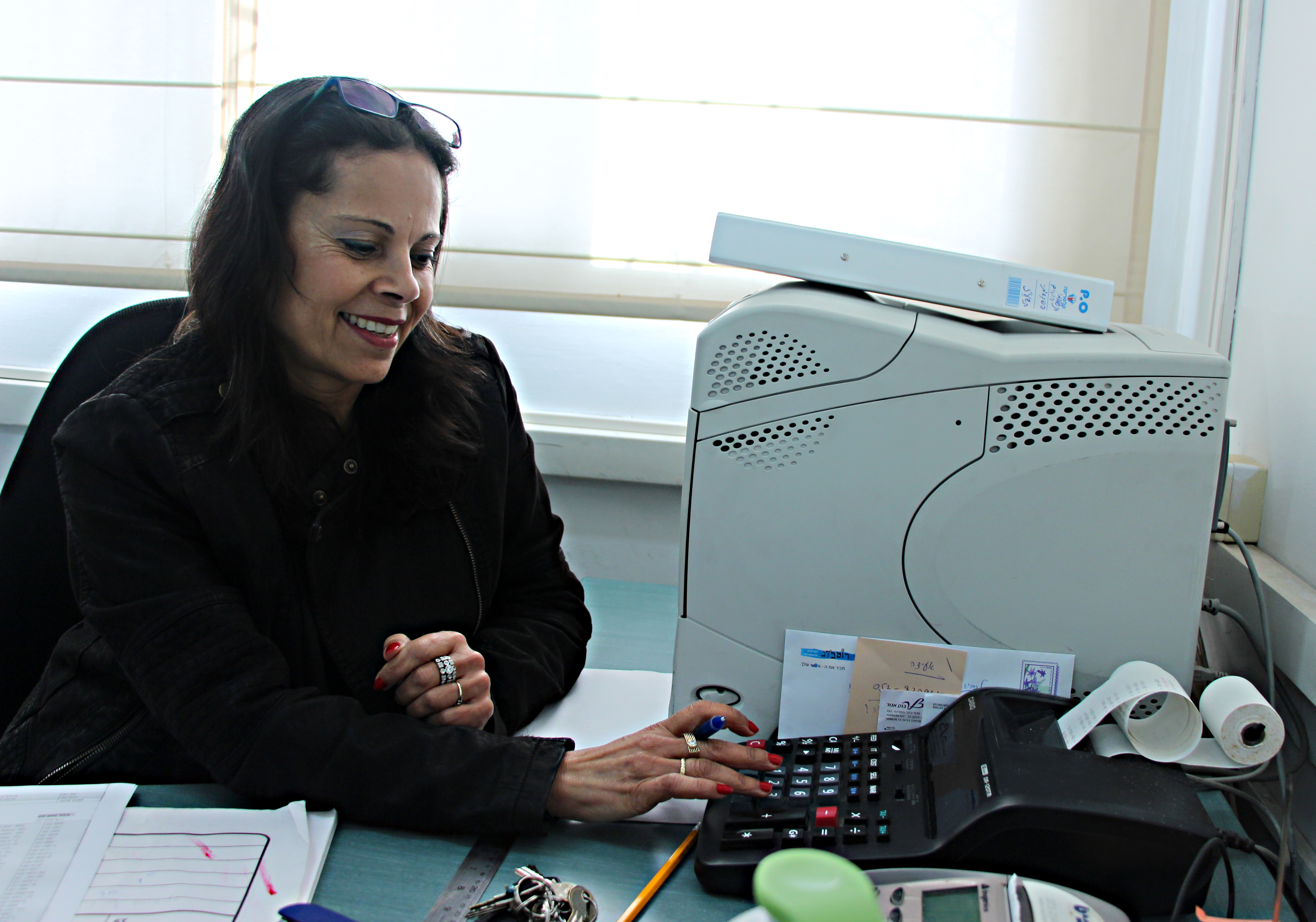 פני כהן מנהלת חשבונות תיכון רוטברג